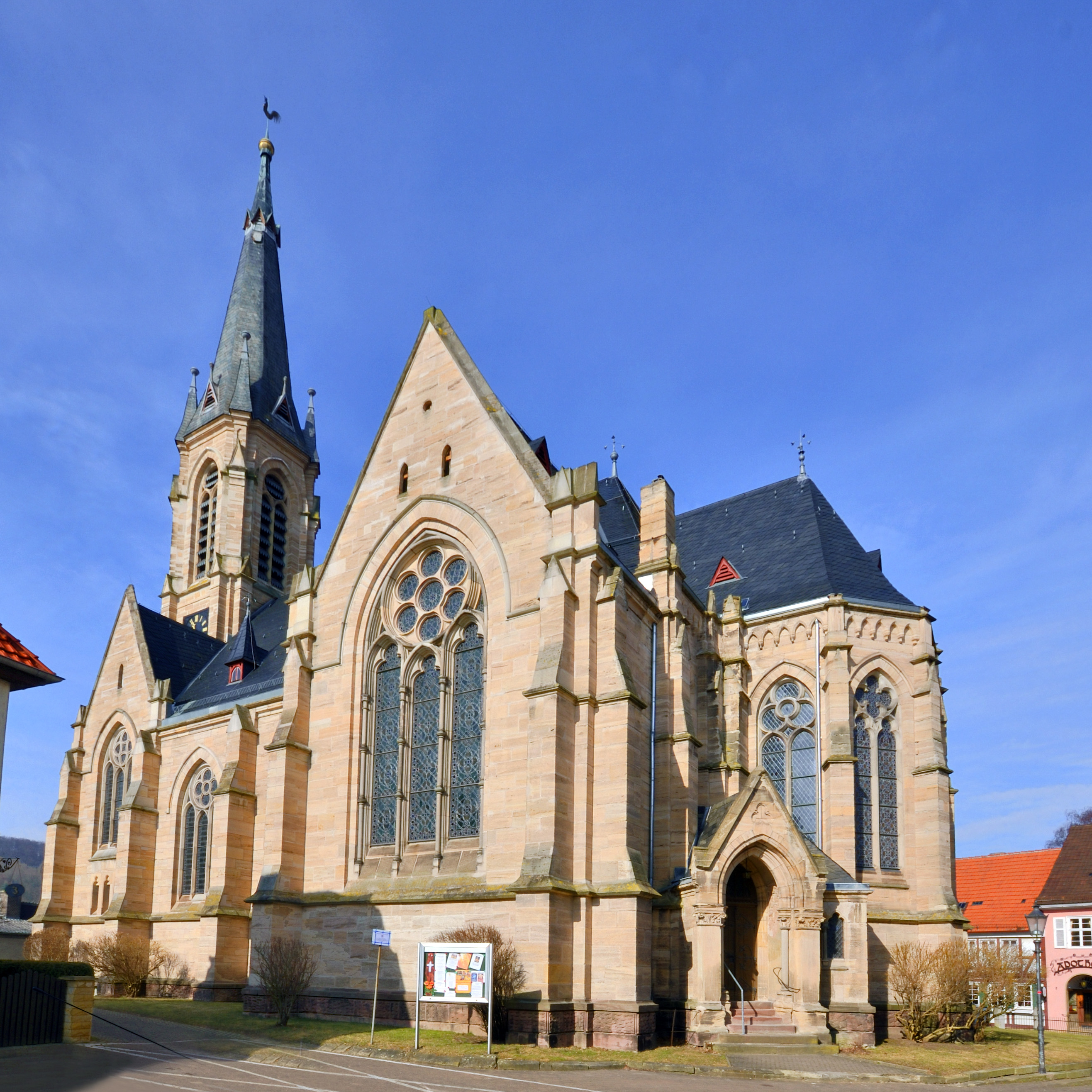 Wanfried ev. Kirche